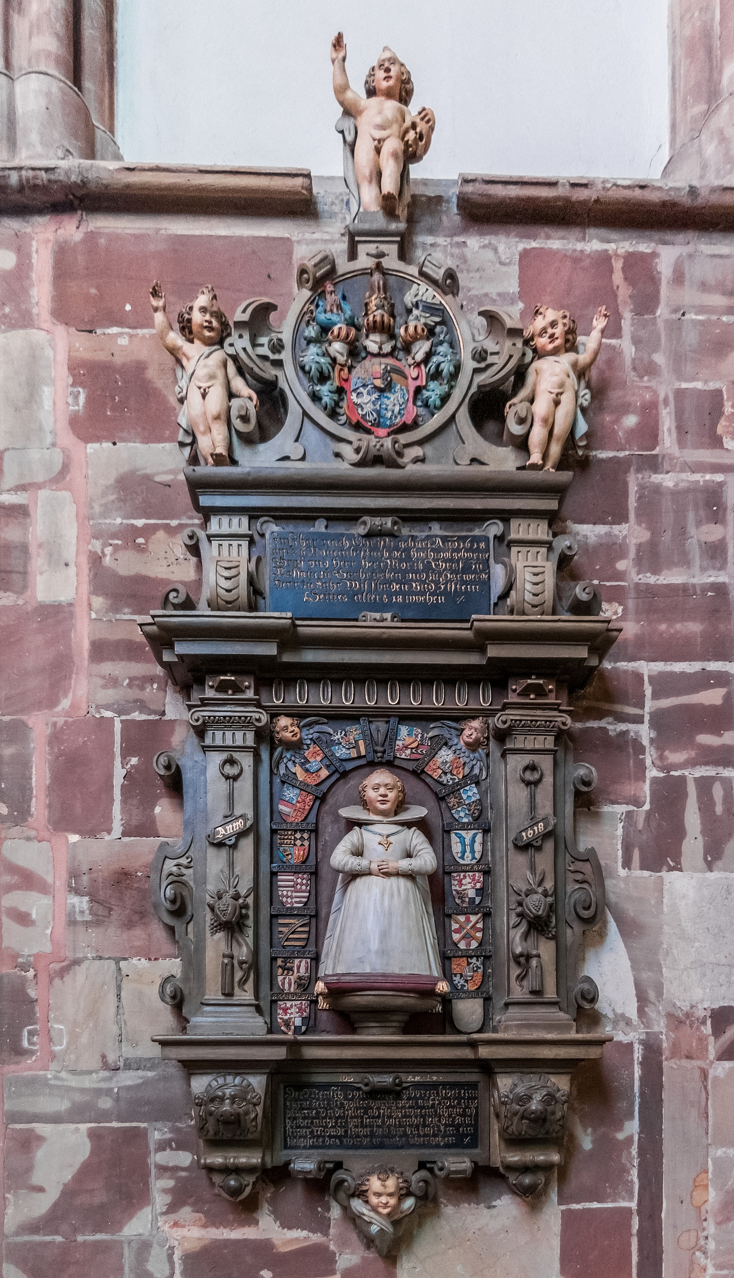 Grabmal in der Stiftskirche St. Arnual Saarbrücken für Moritz von Nassau-Saarbrücken (07/1618–11/1618)